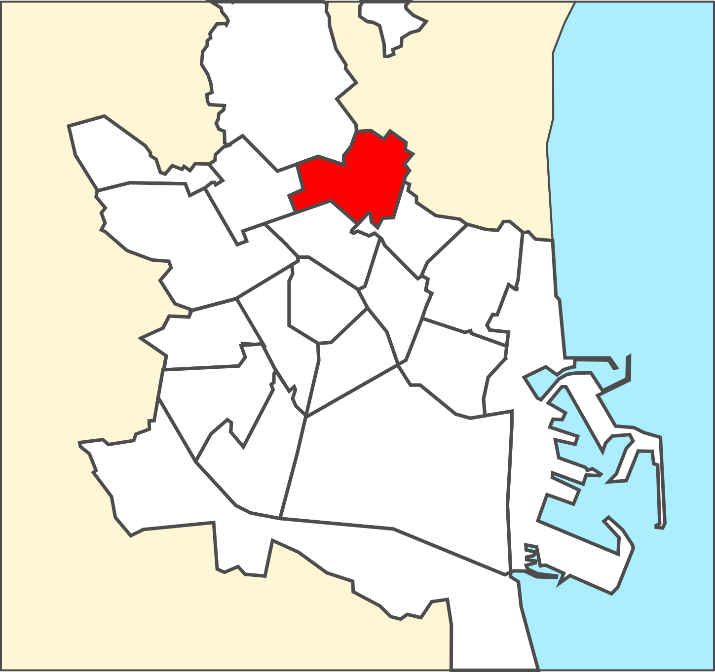 Districte de Rascanya.